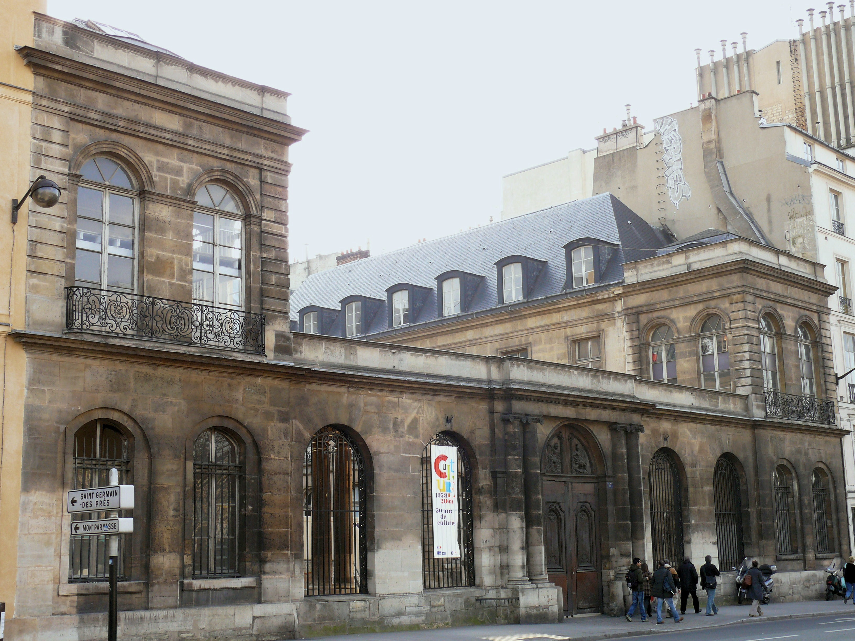 Ancien Hôtel de Chimay, constuit par Mansart dans la première moitié du 17e siècle, fortement remanié au 18e siècle, affecté à l'École des beaux-arts (aujourd'hui ENSBA) vers 1884. - Entrée sur le quai Malaquais, Paris VIe arrondissement, France